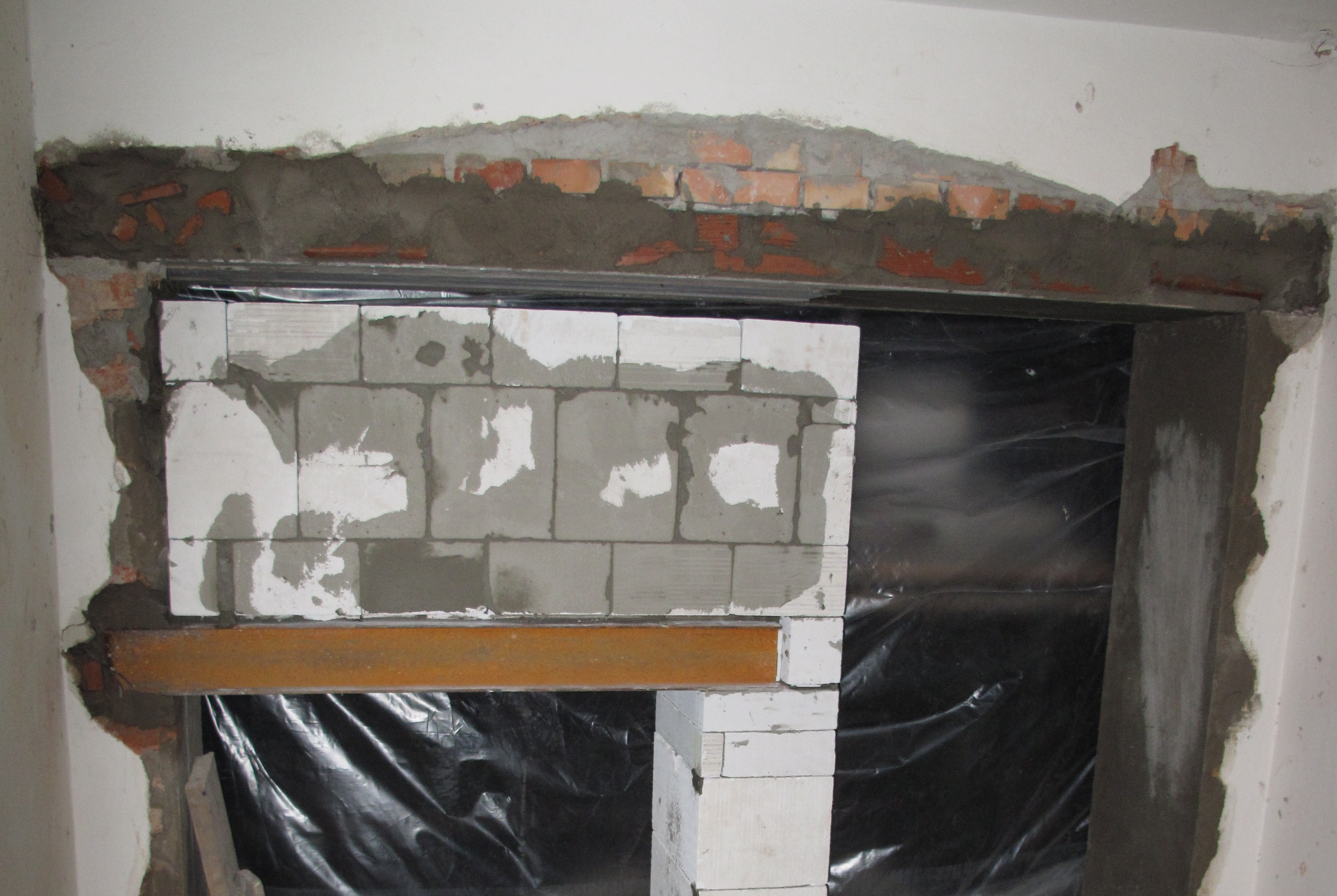 Dva překlady nad sebou. Praha, Česká republika.